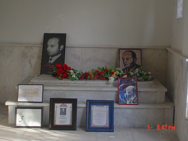 عكس از مزار دكتر علي شريعتي در زينبيه اين عكس در عصر روز تولد حضرت زينب (س) در خرداد ماه سال 1385 گرفته شد . ياد و روانش گرامي باد عکاس: Majid ebadi tavallaei -- مجيد عبادي تولائی برگرفته از: سوريه - زينبيه - مزار دكتر علي شريعتي